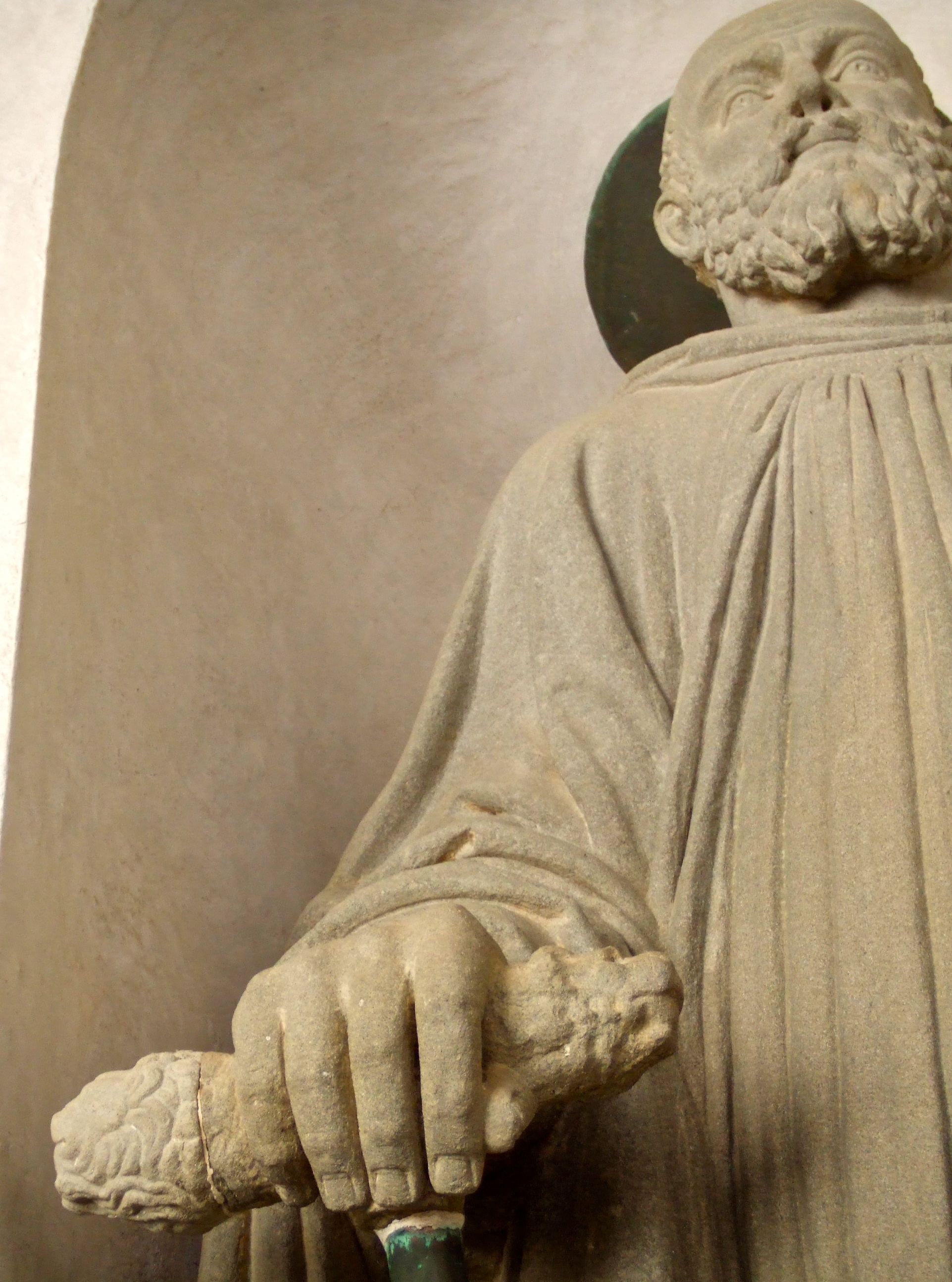 Statue de saint Jean Gualbert tenant son bâton à Vollombreuse